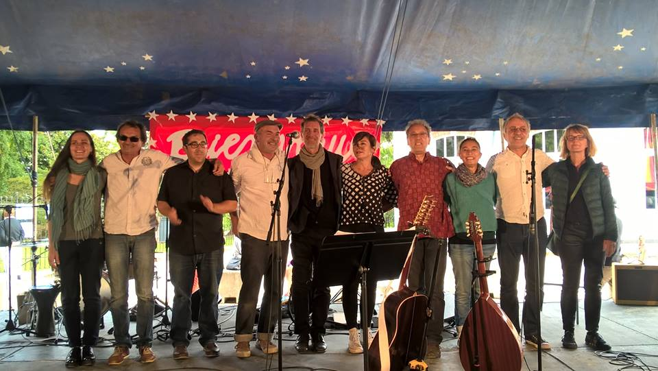 Les artistes du spectacle Bienvenue tous ensemble sur scène pour la première fois